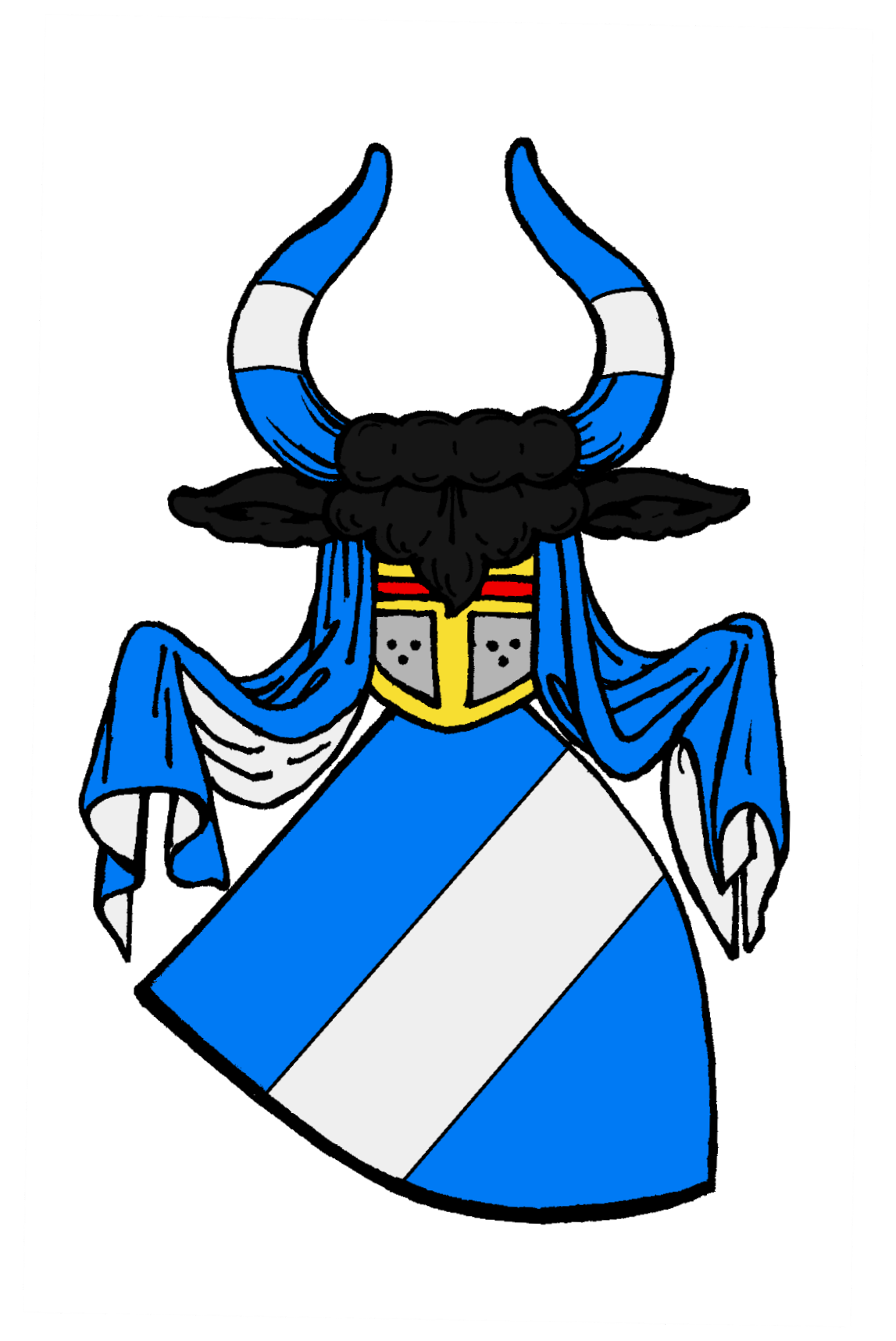 ursprüngliches Stammwappen der von Peccatel